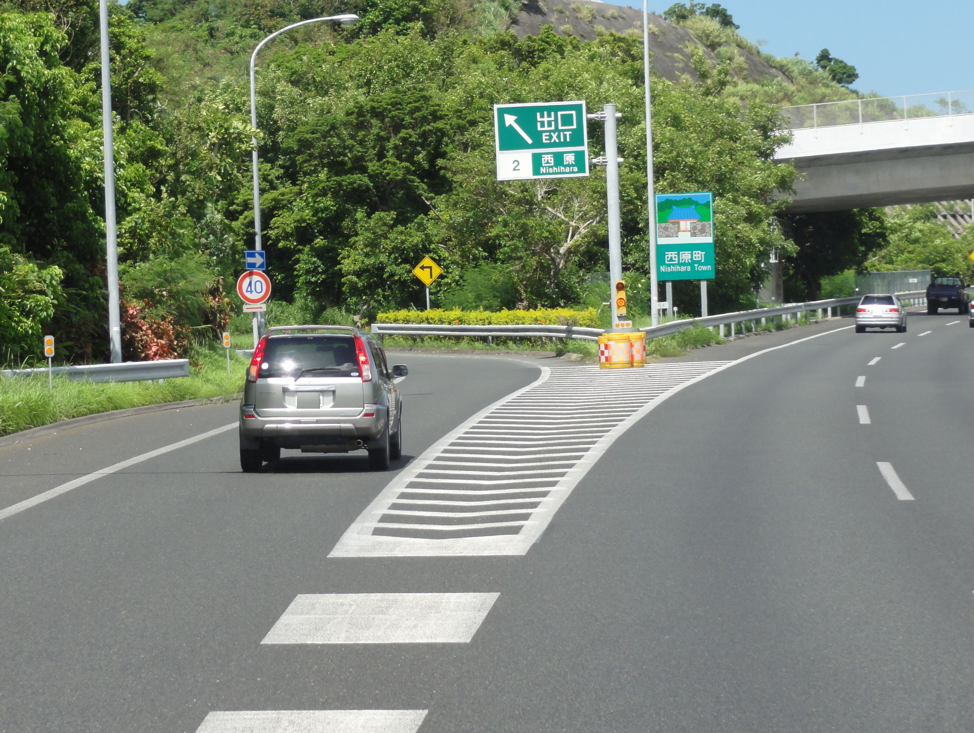 西原インターチェンジ